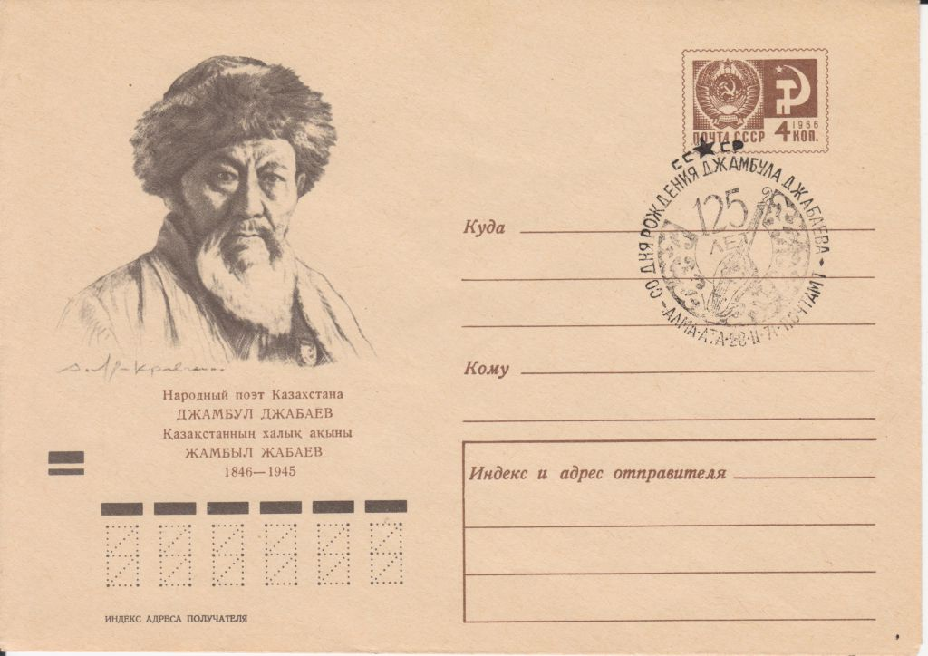 Джамбул Джабаев почтовый конверт 1970